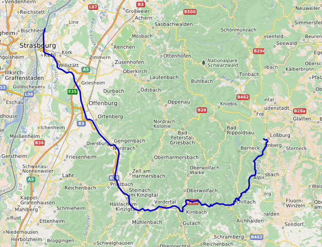 carte réalisée sur umap This map may be incomplete, and may contain errors. Don't rely solely on it for navigation.